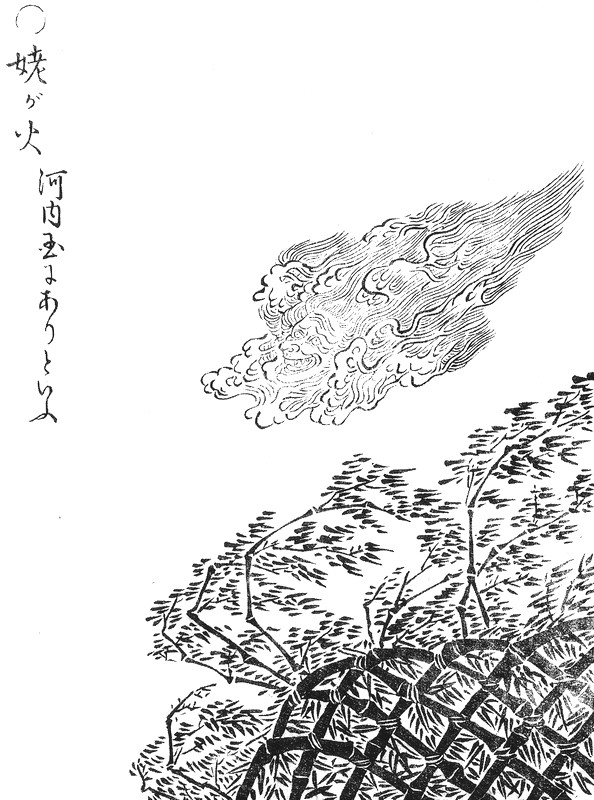 Ubagabi (姥が火) from the Gazu Hyakki Yakō (画図百鬼夜行)